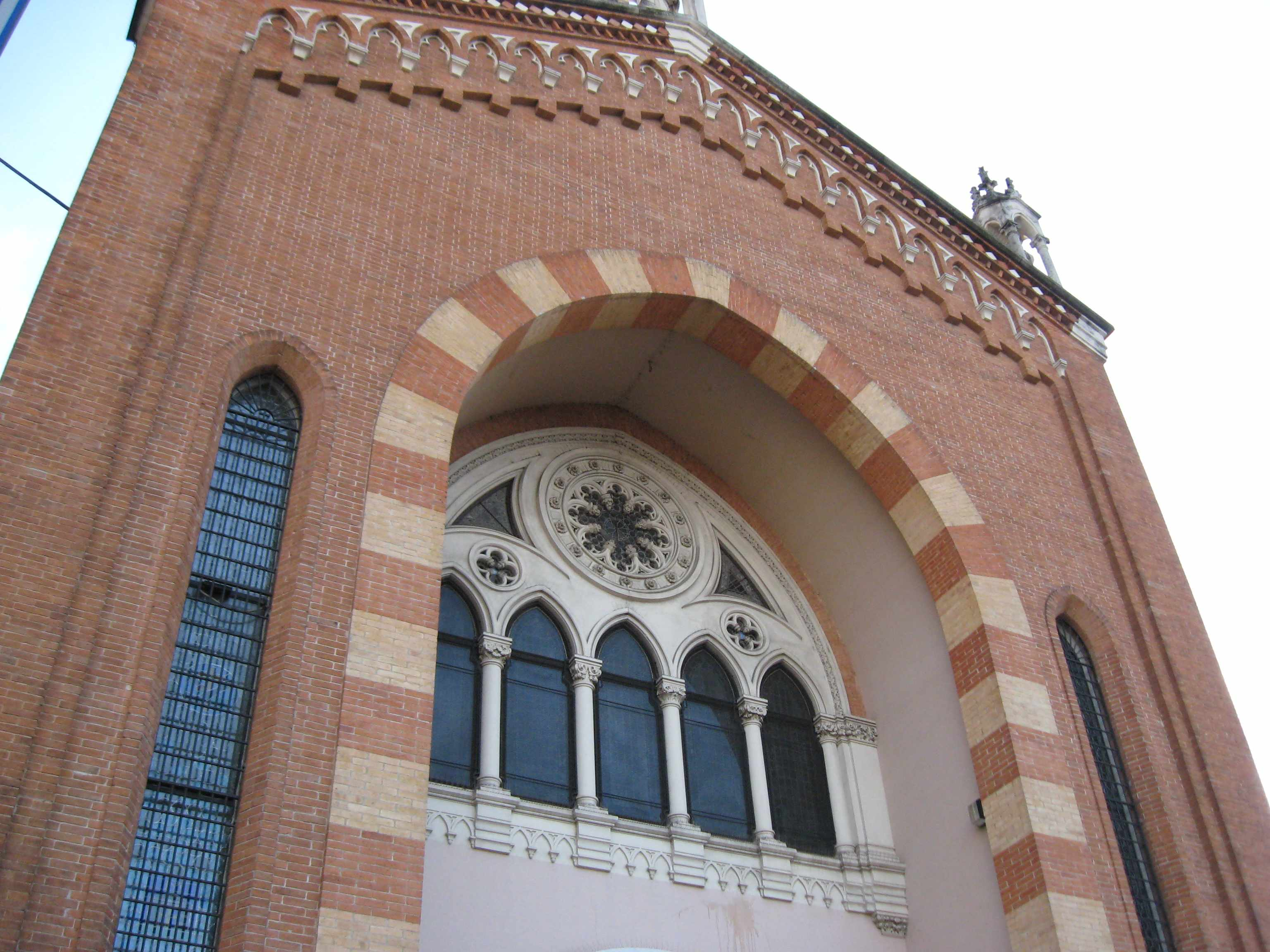 S. Antonino Padova